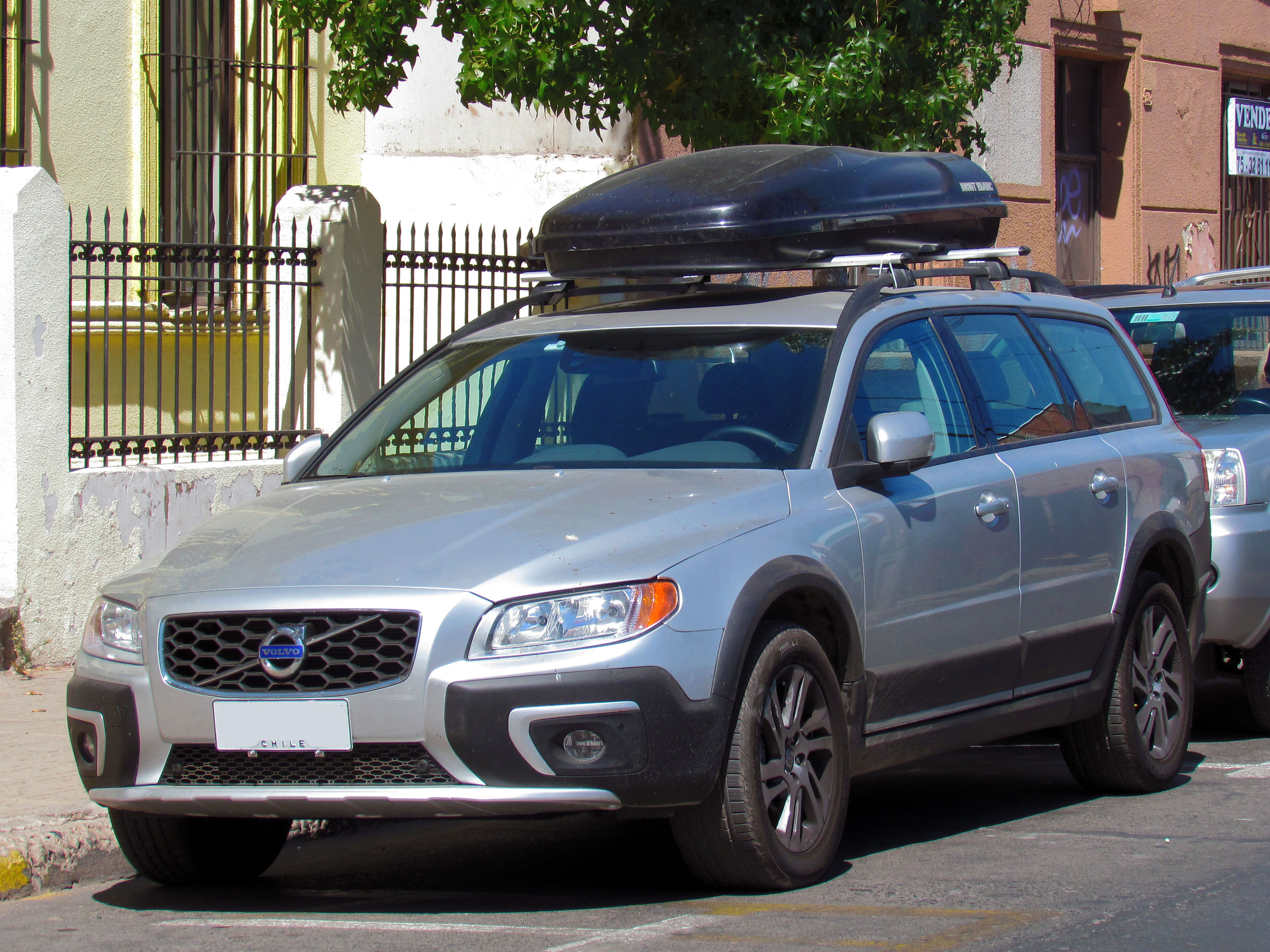 Volvo XC 70 D5 Comfort 2014